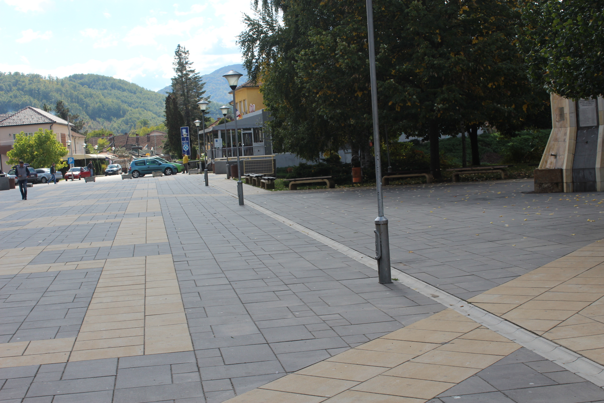 Srpski (latinica): Crveni trg